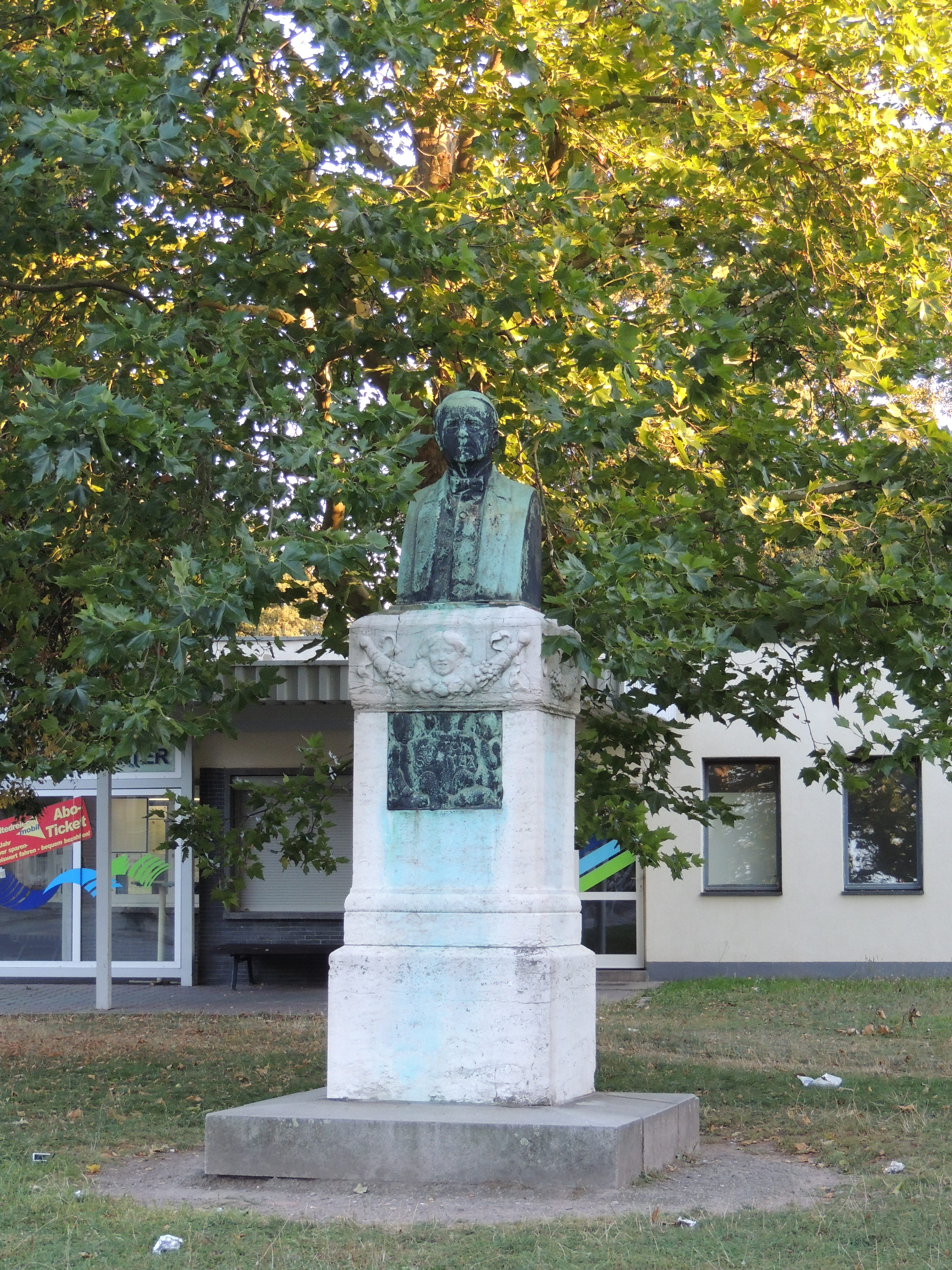 Denkmalgeschütztes Denkmal für den Heimatdichter Anton Sommer; Anger Rudolstadt